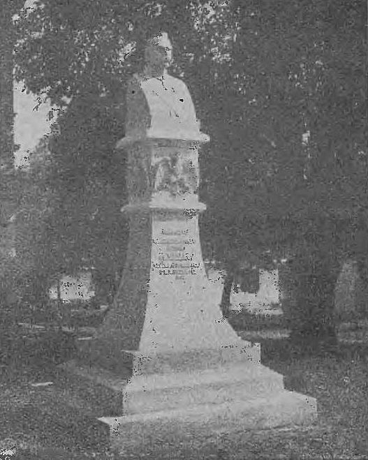 Pomnik Józefa Piłsudskiego w ogrodzie Szefostwa Intendentury w Przemyślu (-1933)